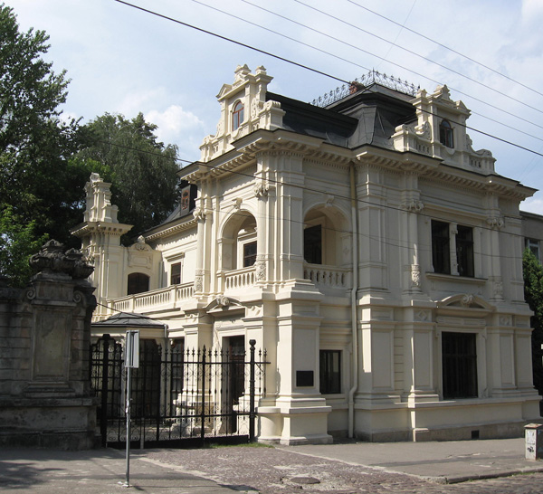 Sapieha Palace in Lviv